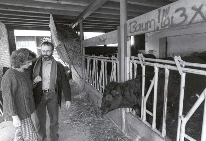 Stephanie und Ruedi Baumann, Schweizer Politikerin (SP) und Schweizer Politiker (Grüne), das erste Ehepaar im Nationalrat